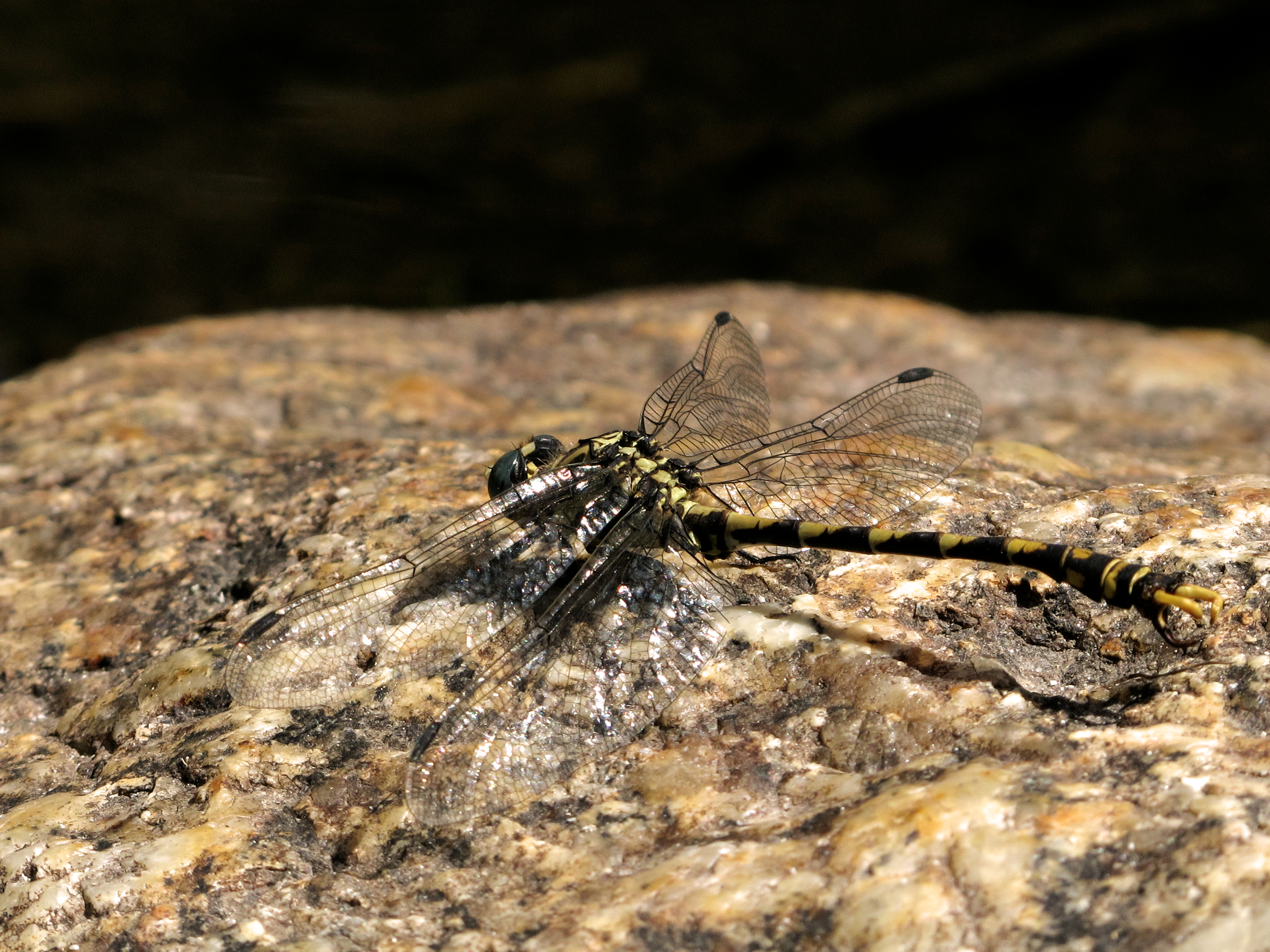 Libélula de colores amarillo y negro. Ojos de color azulado en la zona mediterranea En Onychogomphus forcipatus, encontraremos que el triángulo anal de las alas posteriores está formado por 3 celdillas, mientras en Onychogomphus uncatus está formado por 4 celdillas. Tambien hay mas detalles que los diferenica, pero mi foto ninguno de ellos se ve claramente excepto que predomina mas el negro que el amarillo por lo que podria ser O.uncatus Esta considerada como vulnerable en España.